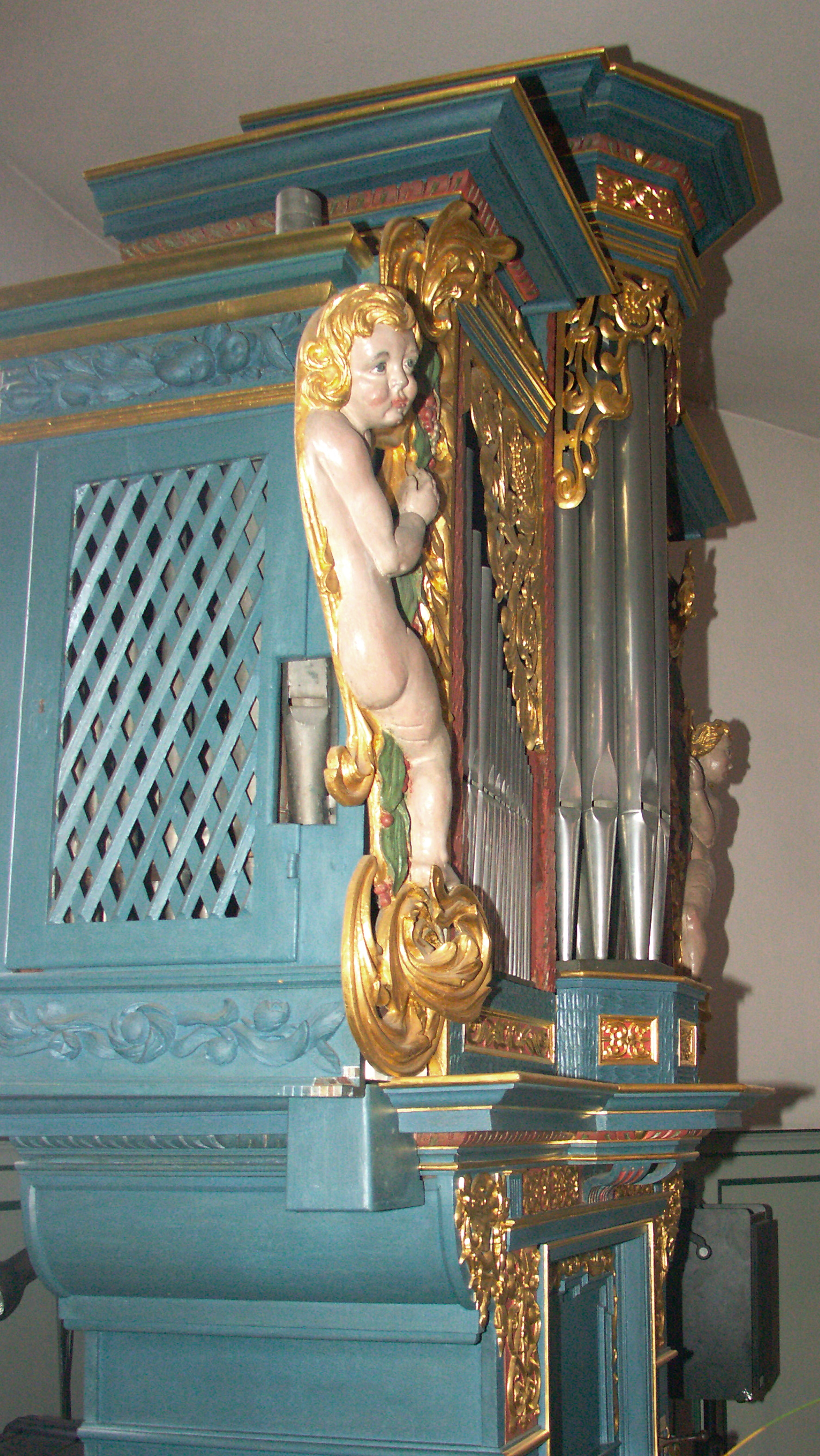 Orgel in Worfelden, Ev. Kirche, musikalischer Engel